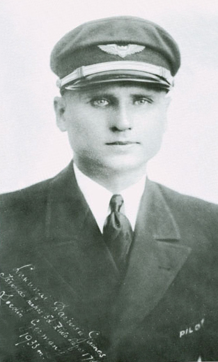 Stasys Girenas (1930)